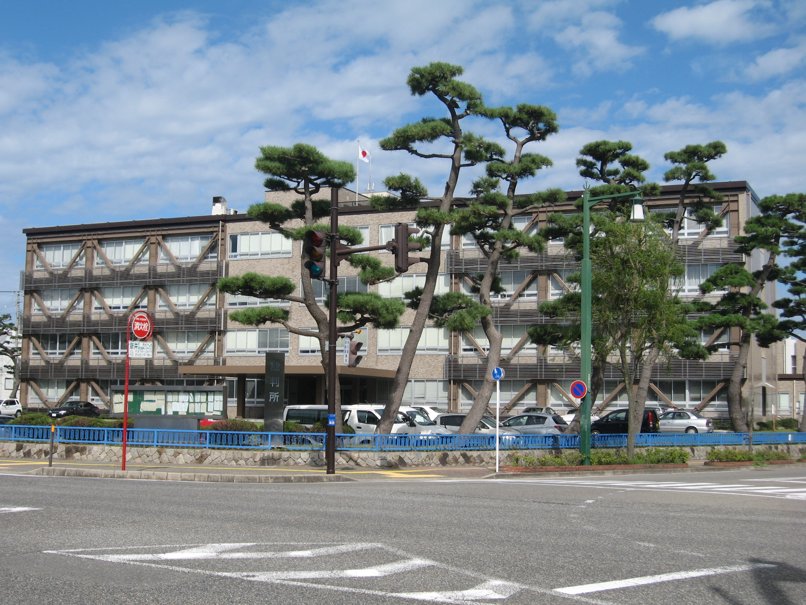 新潟地方裁判所の画像。